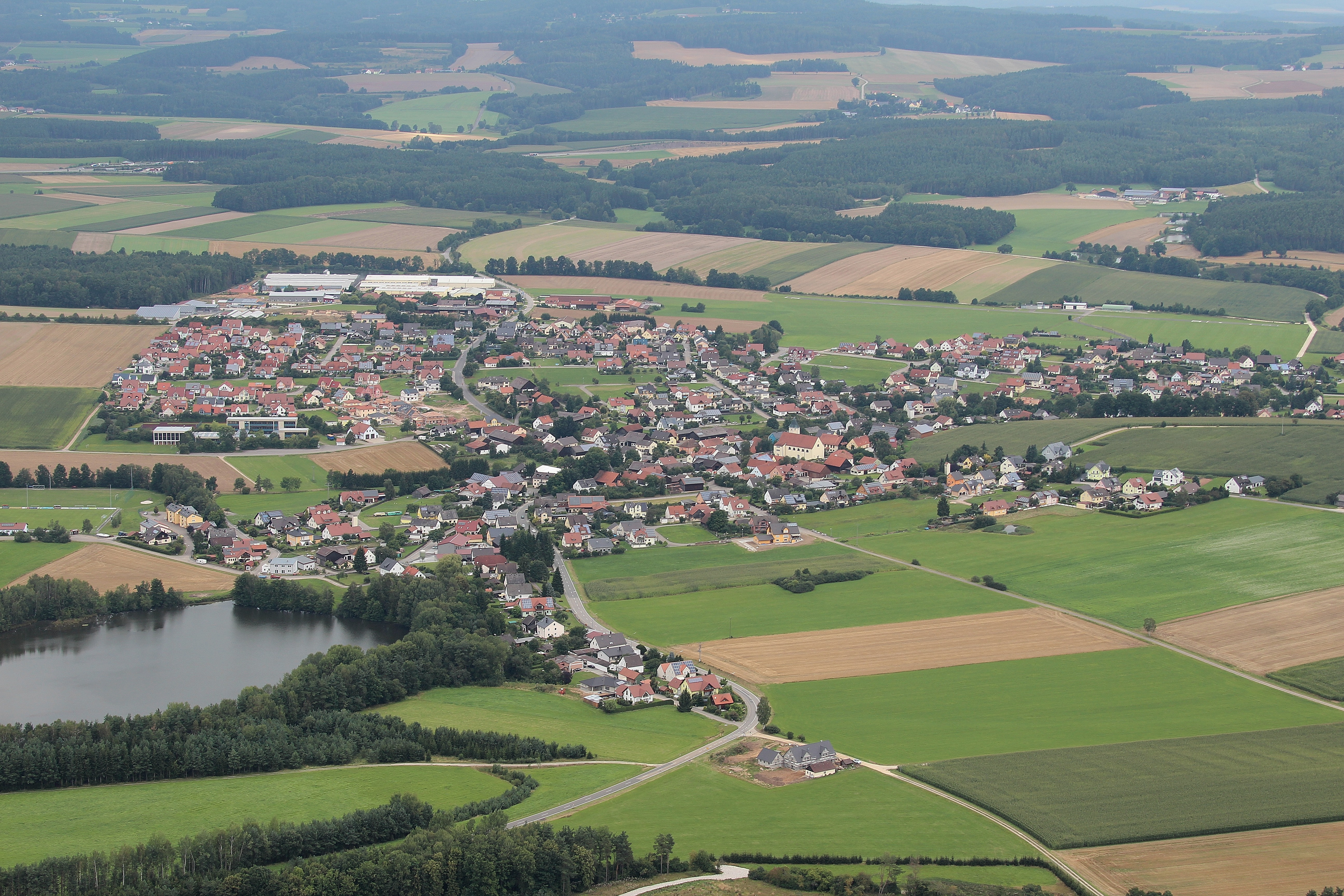 Schmidgaden, Landkreis Schwandorf, Oberpfalz, Bayern